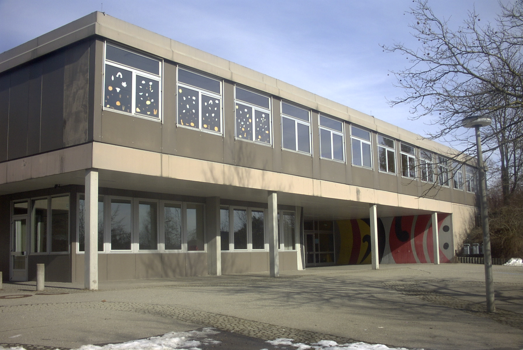 Gymnasium am Deutenberg, Nebengebaeude Hallerhoehe, Villingen-Schwenningen, Deutschland